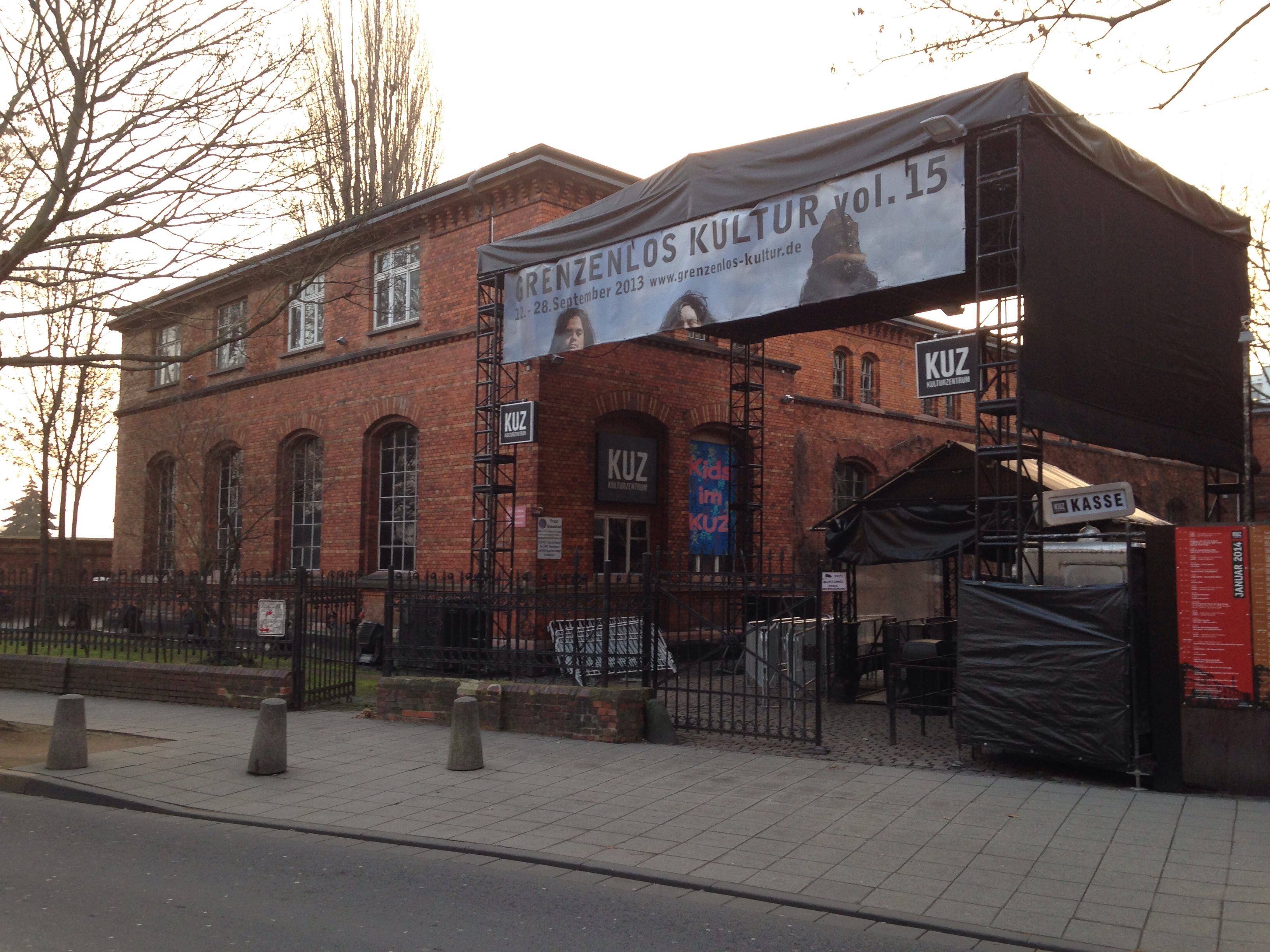 KUZ Mainz in der Dagobertstraße 20b: ehemalige Garnisons-Waschanstalt; langgestreckter Klinkerbau mit Querflügeln, 1888, Architekt Garnisons-Bauinspektor Reinmann